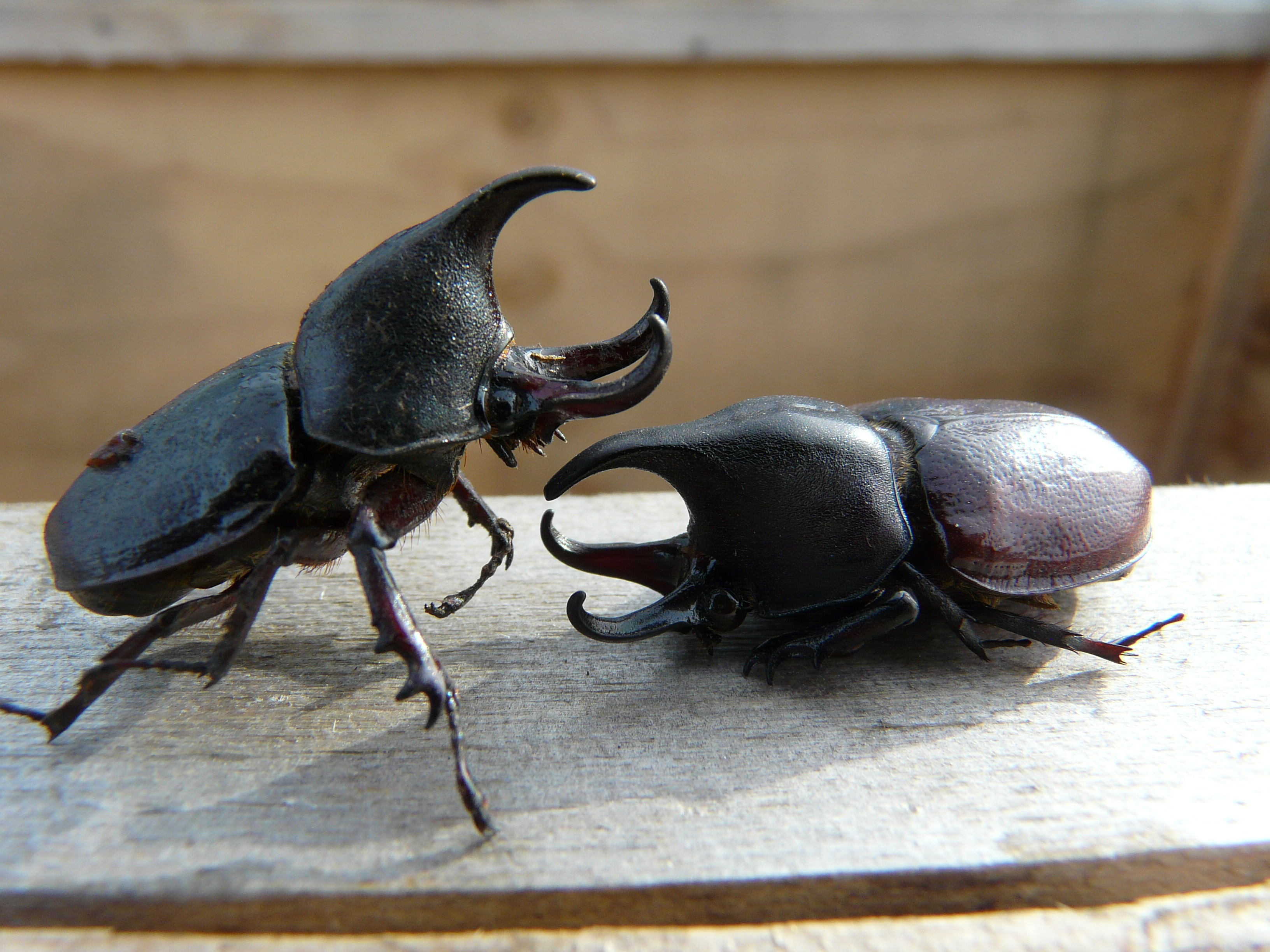 lucha de rinocerontes 1